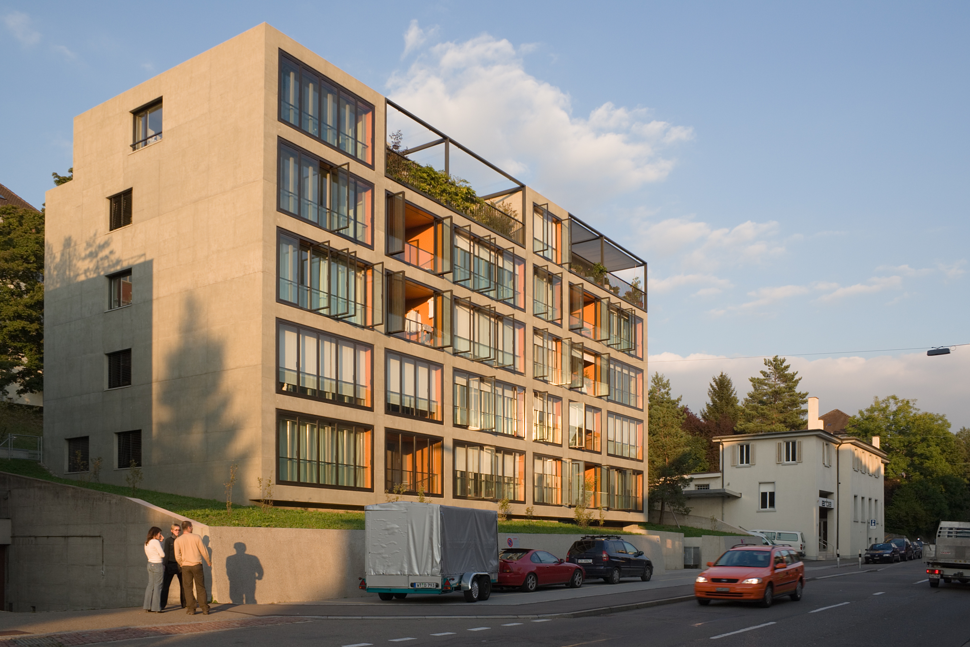 Mehrfamilienhaus mit 12 Wohnungen an der Breitensteinstrasse 50 in Zürich. SchweizBirchmeier Kaufmann Architekten, Eigentümer Dr. St. à Porta Stiftung